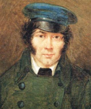 Francesco Caracciolo (Napoli, 18 gennaio 1752 – Napoli, 28 giugno 1799) è stato un ammiraglio italiano.